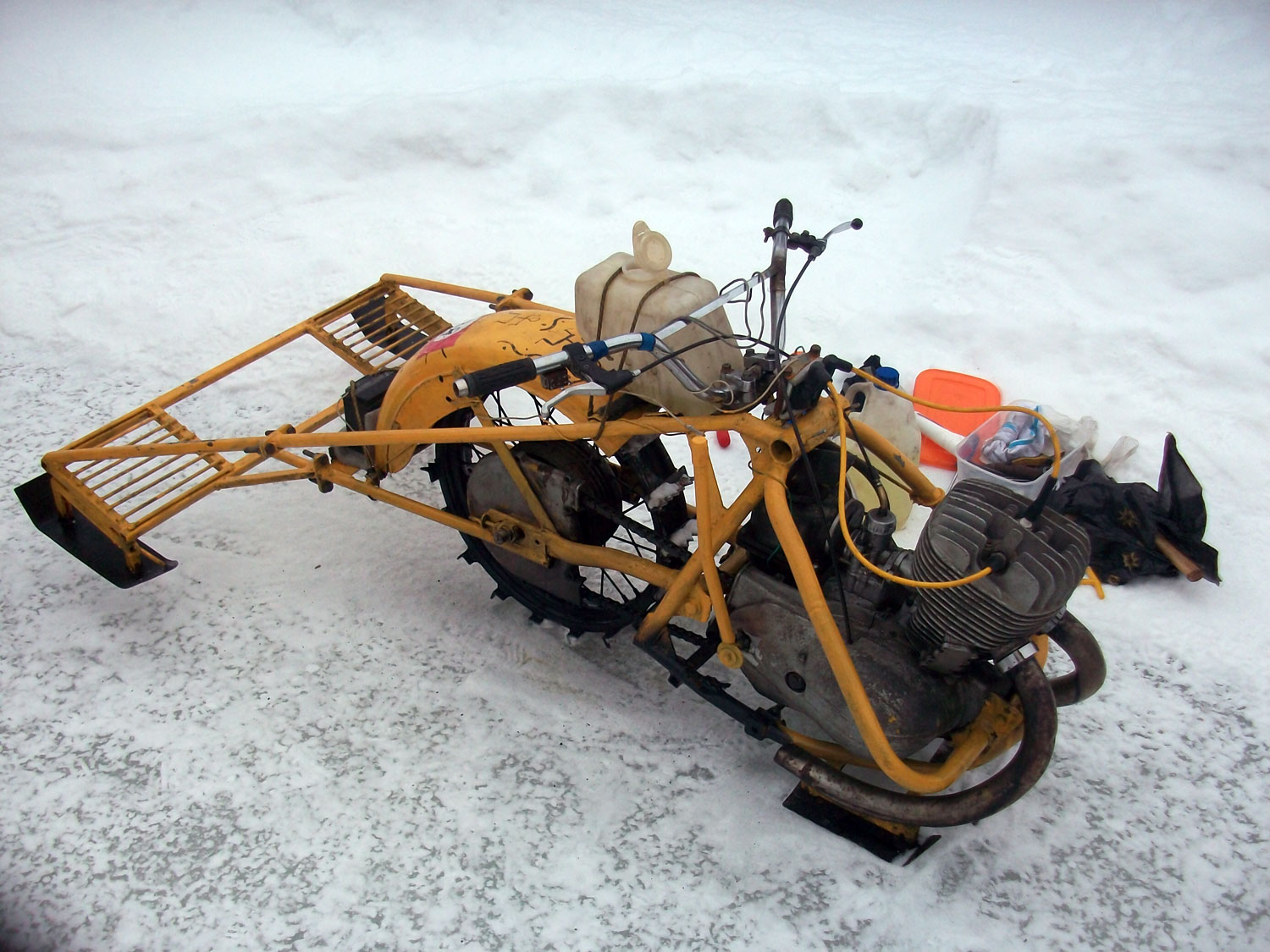 Унимото на зимнем мотослёте "Snow Dogs"